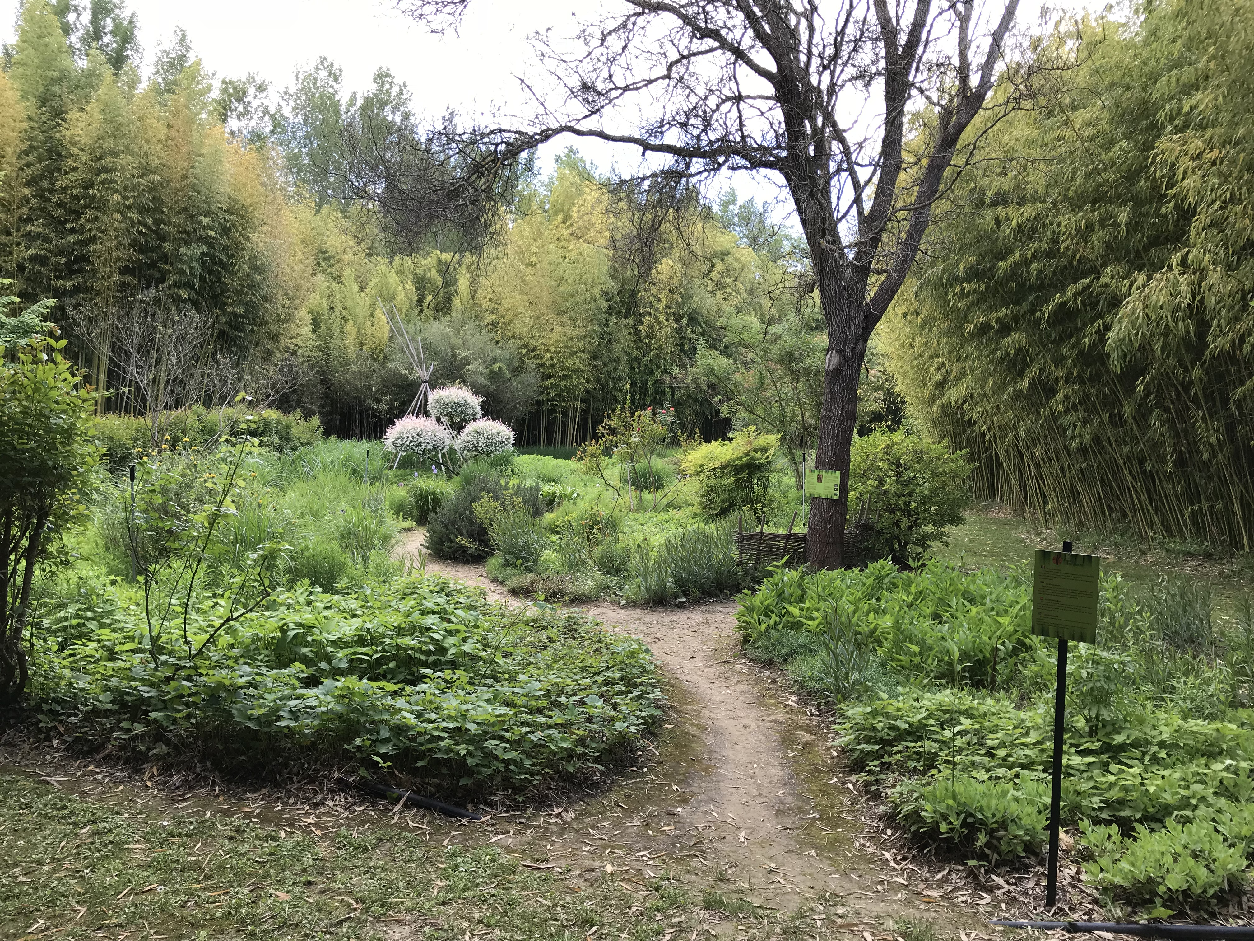 Parc aux Bambous de Lapenne (Ariège, France).